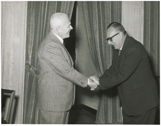 Il presidente della Camera dei Deputati Alessandro Pertini riceve l'onorevole Mariano Rumor incaricato di formare il nuovo governo